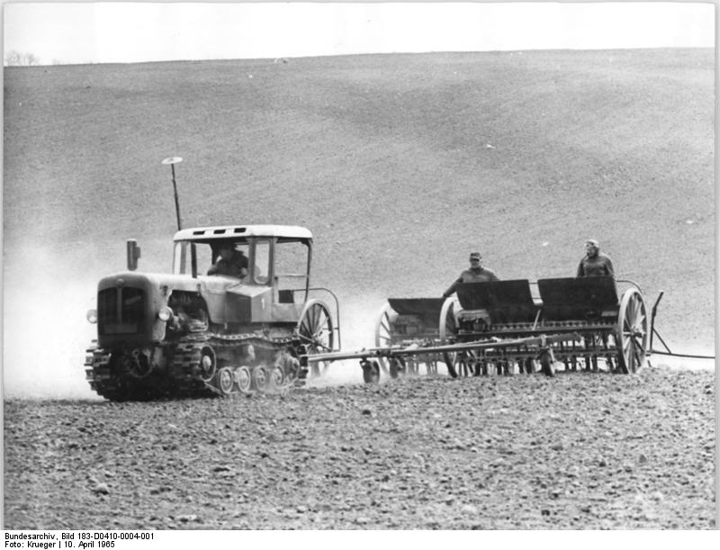 LPG Lebus, Aussaat Zentralbild Krueger Kn 10.4.1965 Mit einem Dreierzug drillen die Getreidespezialisten der LPG "Völkerfreundschaft" in Lebus, Kreis Seelow, auf einem 20ha grossen Feld Sommergerste.